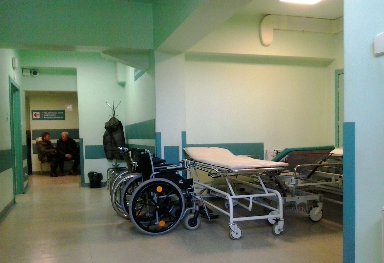 Szpital Wojewódzki w Poznaniu - izba przyjęć.